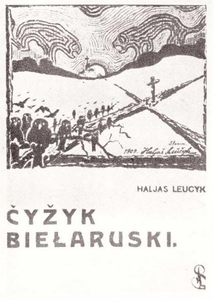 Гальяш Леўчык